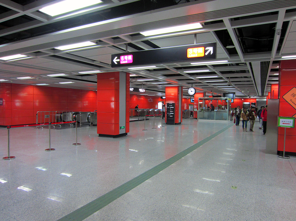 燕塘站站廳